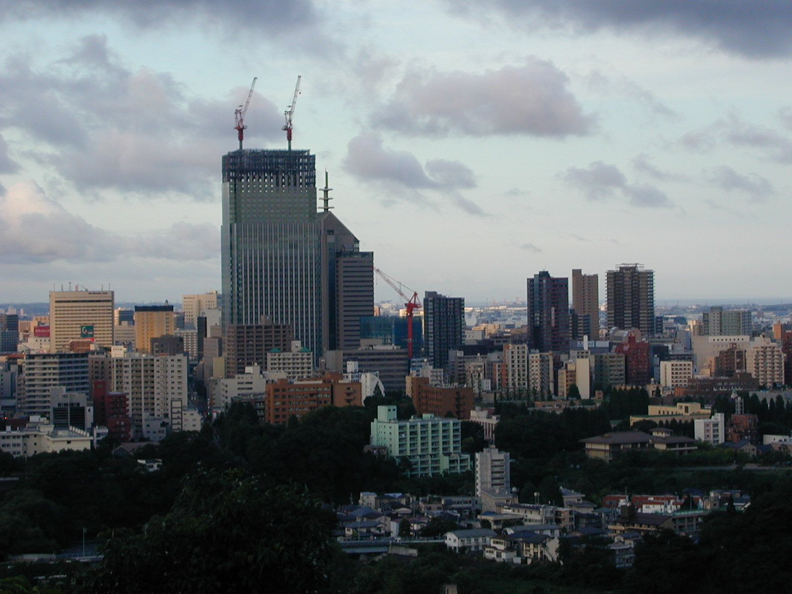 2009年7月15日に上棟した仙台トラストタワーを、2009年7月20日に仙台城天守台から撮影。ザ・レジデンス一番町はまだ半分程度の高さまでしか組み上がっていない。